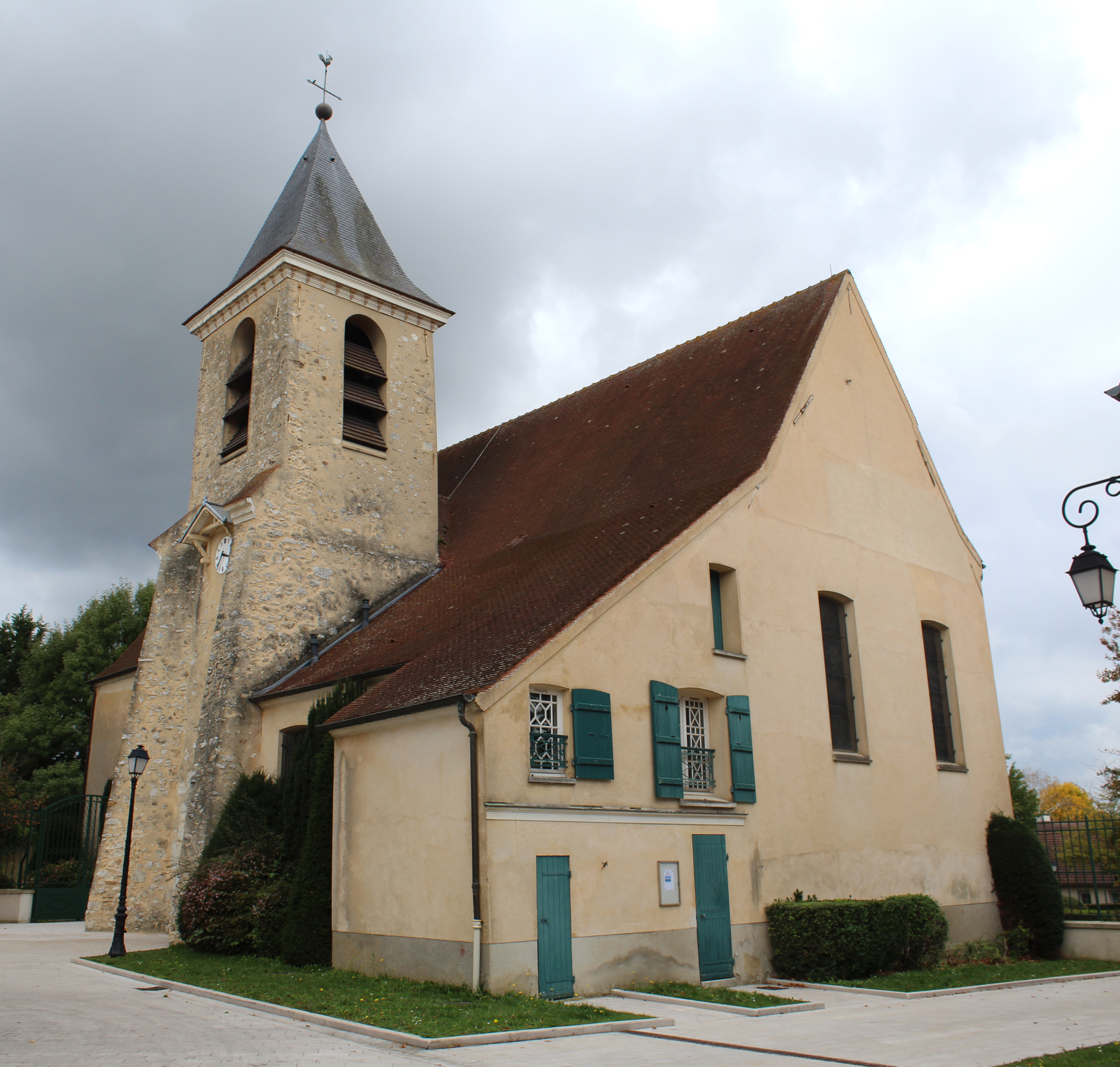 Église Saint-Nicolas de Chessy, Seine-et-Marne.